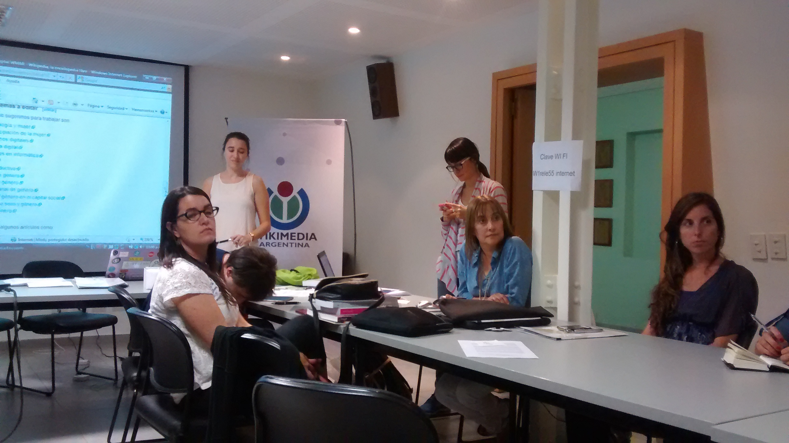 Cobertura de la editatón de género y brecha digital realizada en IIPE UNESCO el sábado 21 de marzo.